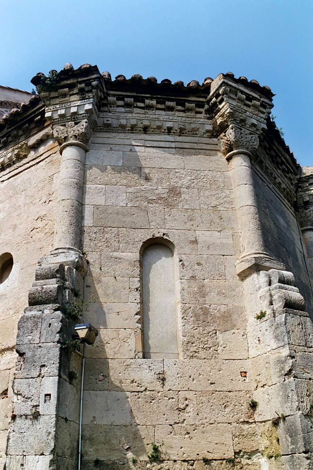 France - Languedoc - Hérault - Église Saint-Jacques de Béziers